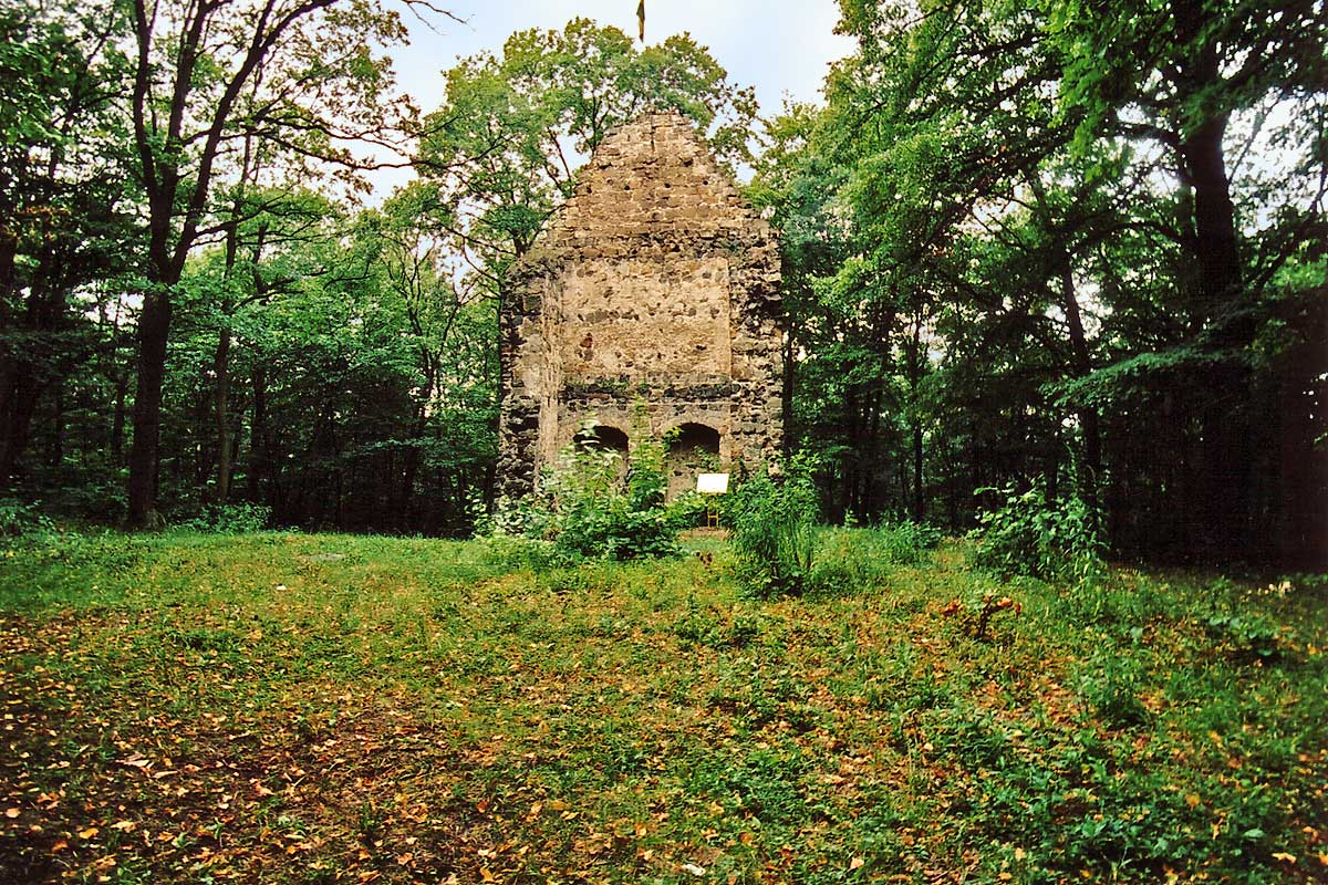 Zamek w Rokitnicy